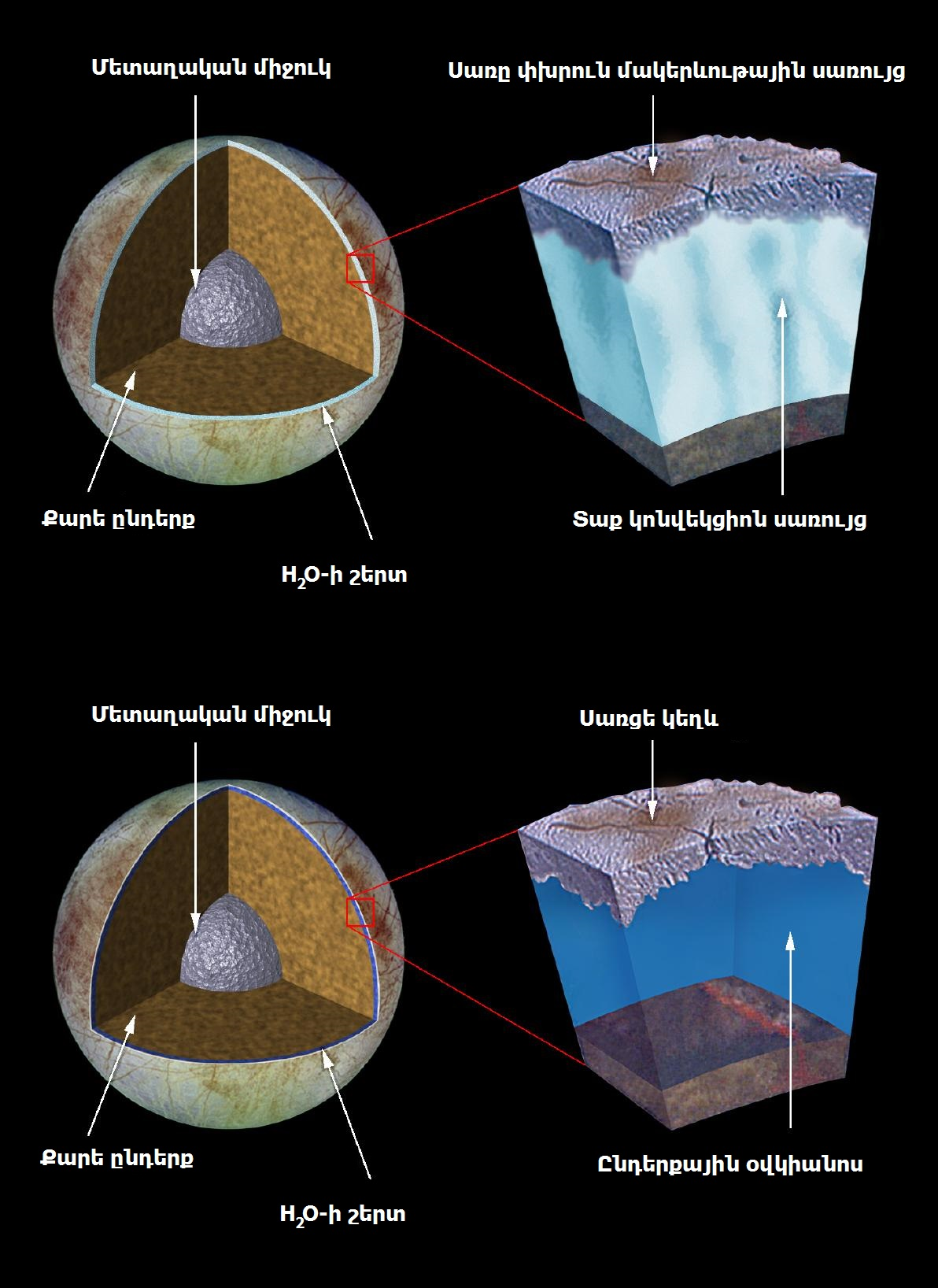 Եվրոպայի ընդերքի կազմության հնարավոր երկու տարբերակները